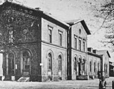 Bf Jülich (alt)